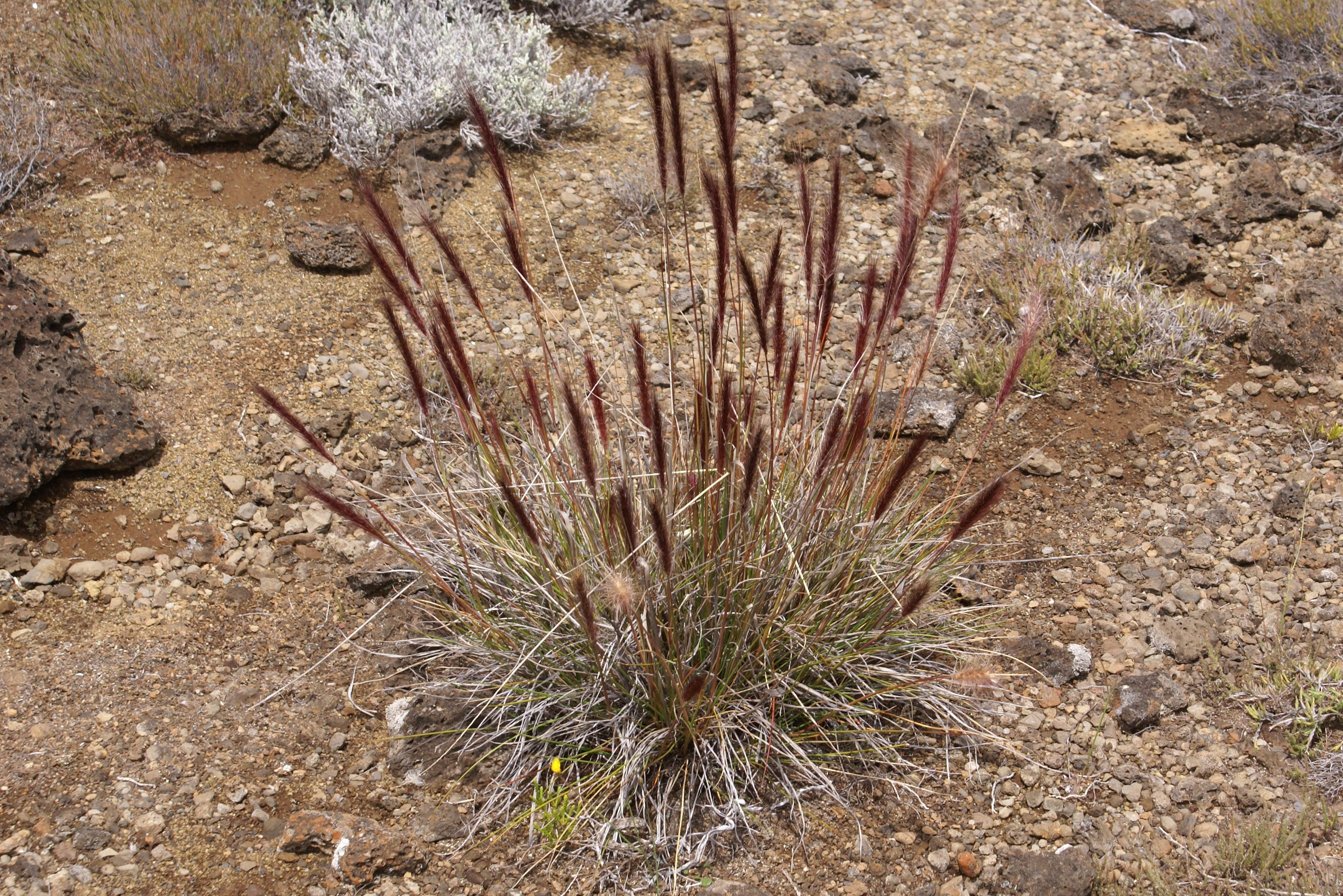 Touffe de Pennisetum caffrum (près du Pas des Sables)